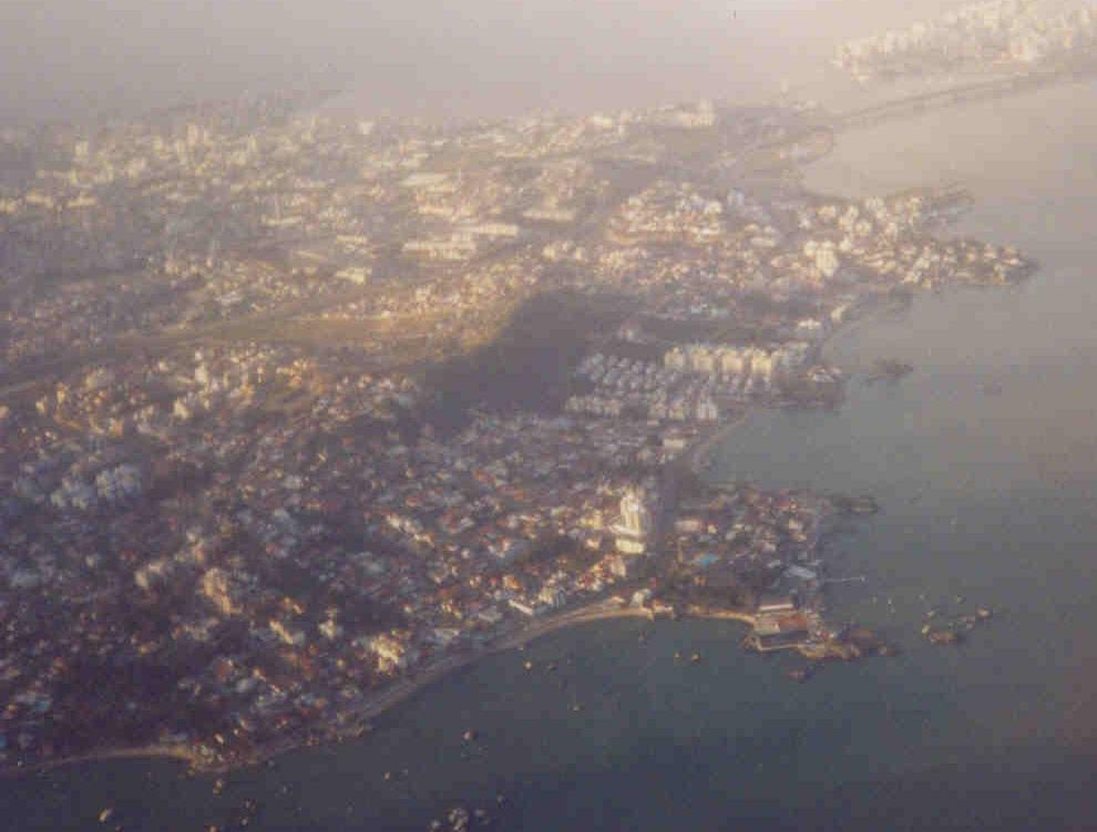 Florianópolis bairros do continente - Bom Abrigo, Coqueiros, Estreito, Itaguaçu e pontes. Foto aérea de 2004 por Marcos Souza. Liberada para uso geral.